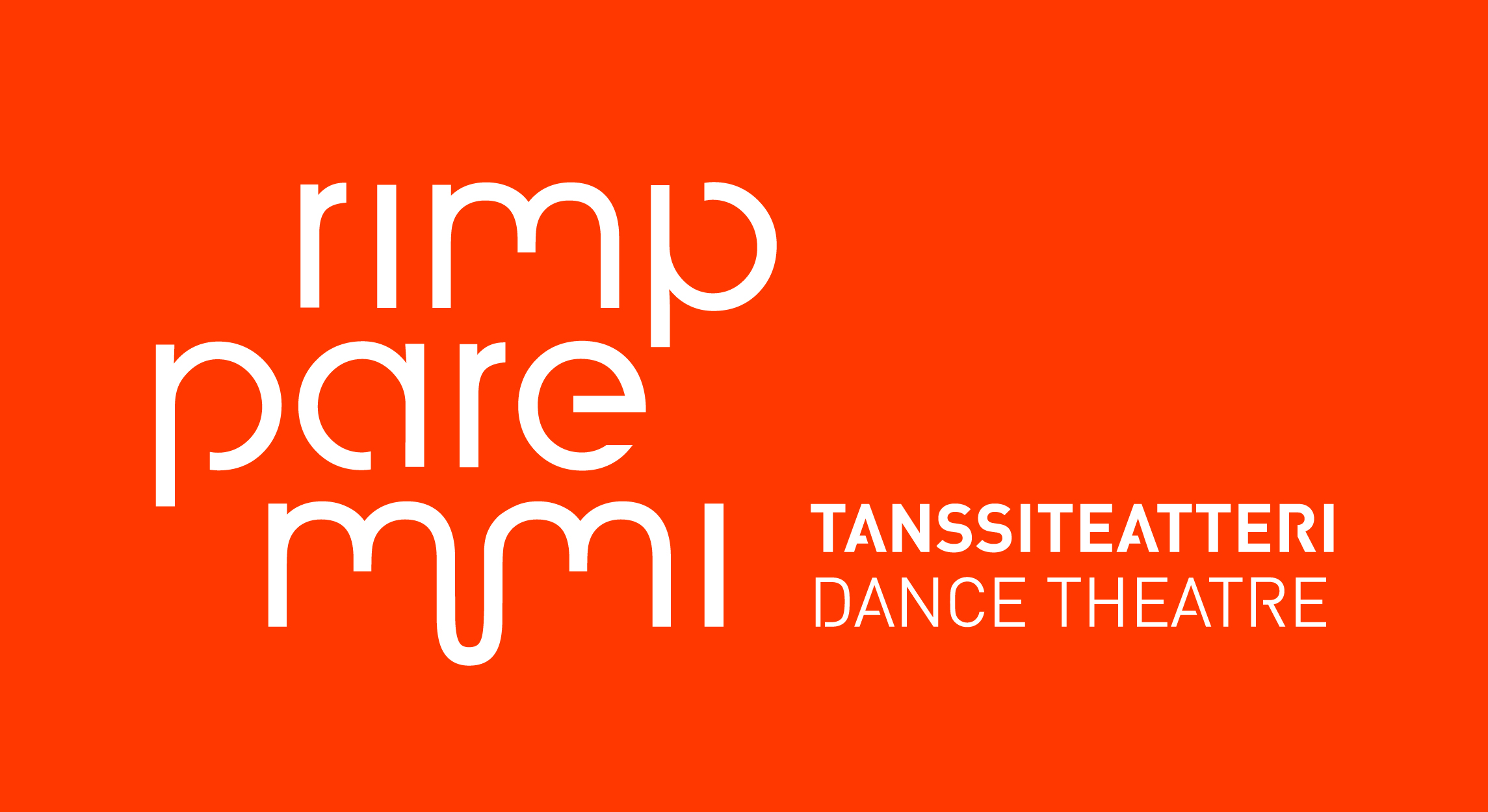 Tanssiteatteri Rimpparemmin logo